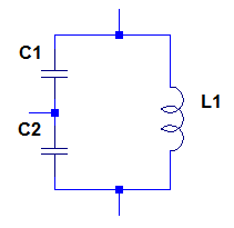 Joonis 1. Colpittsi kolmpunkt lülituse võnkering